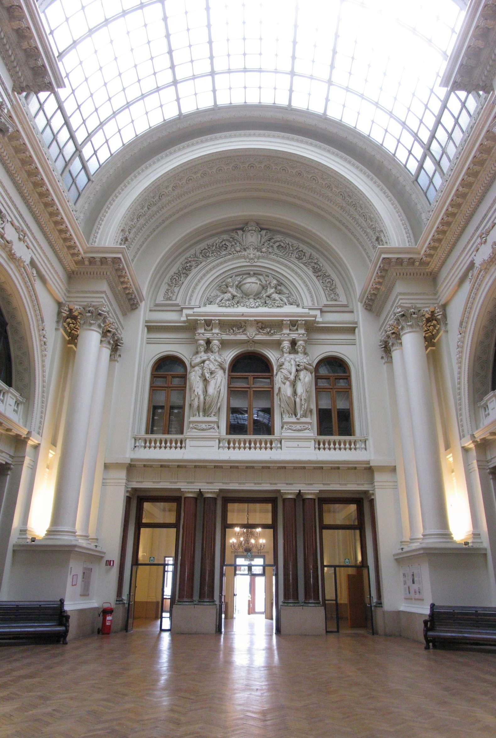 Bruxelles, Palais de la Bourse et Cariatides, journées du Patrimoine